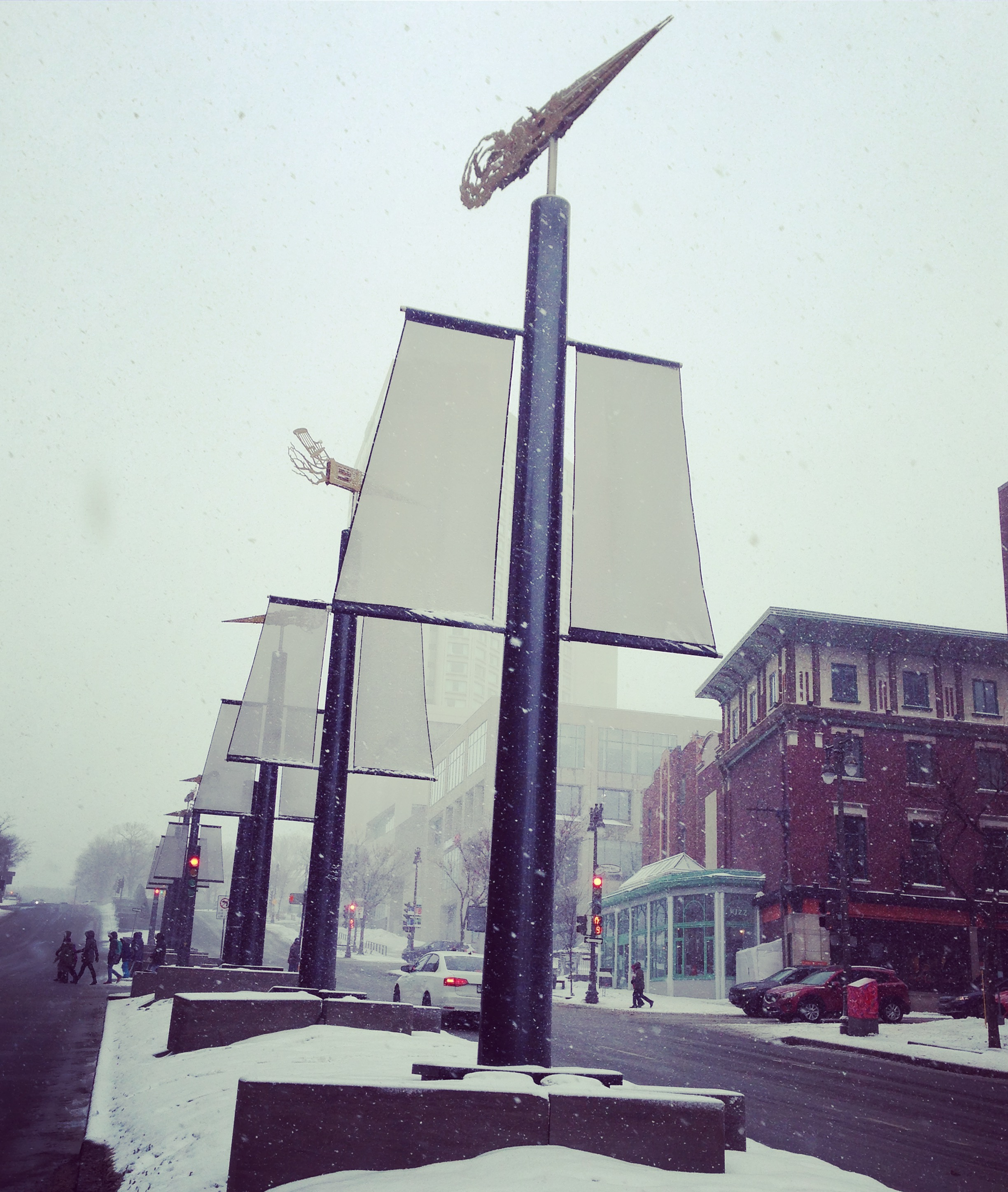 Oeuvre d'art installée sur le boulevard Honoré-Mercier à Québec